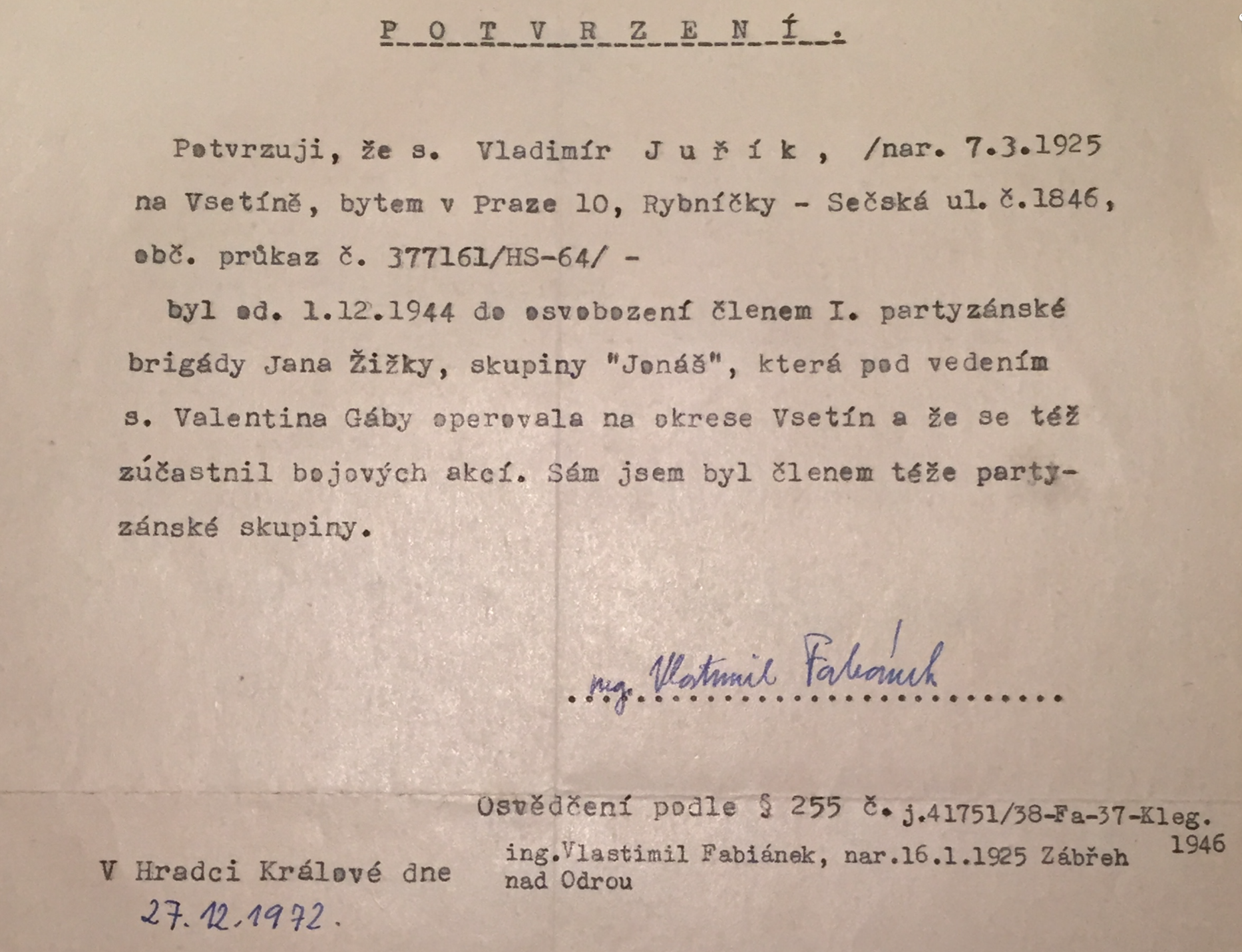 Confirmation of eyewitness Vlastimil Fabiánek about Juřík's participation in the fighting in the 1st partisan brigade of Jan Žižka in the area of Vsetín between 1944 and 1945.